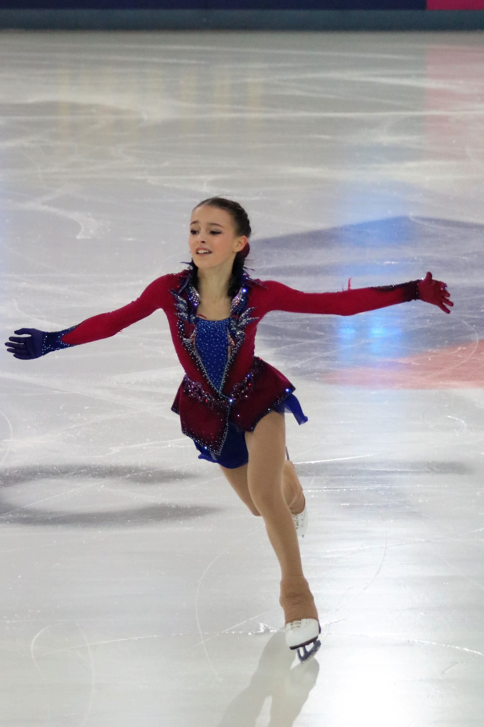 Анна Щербакова на чемпионате России по фигурному катанию на коньках 2019